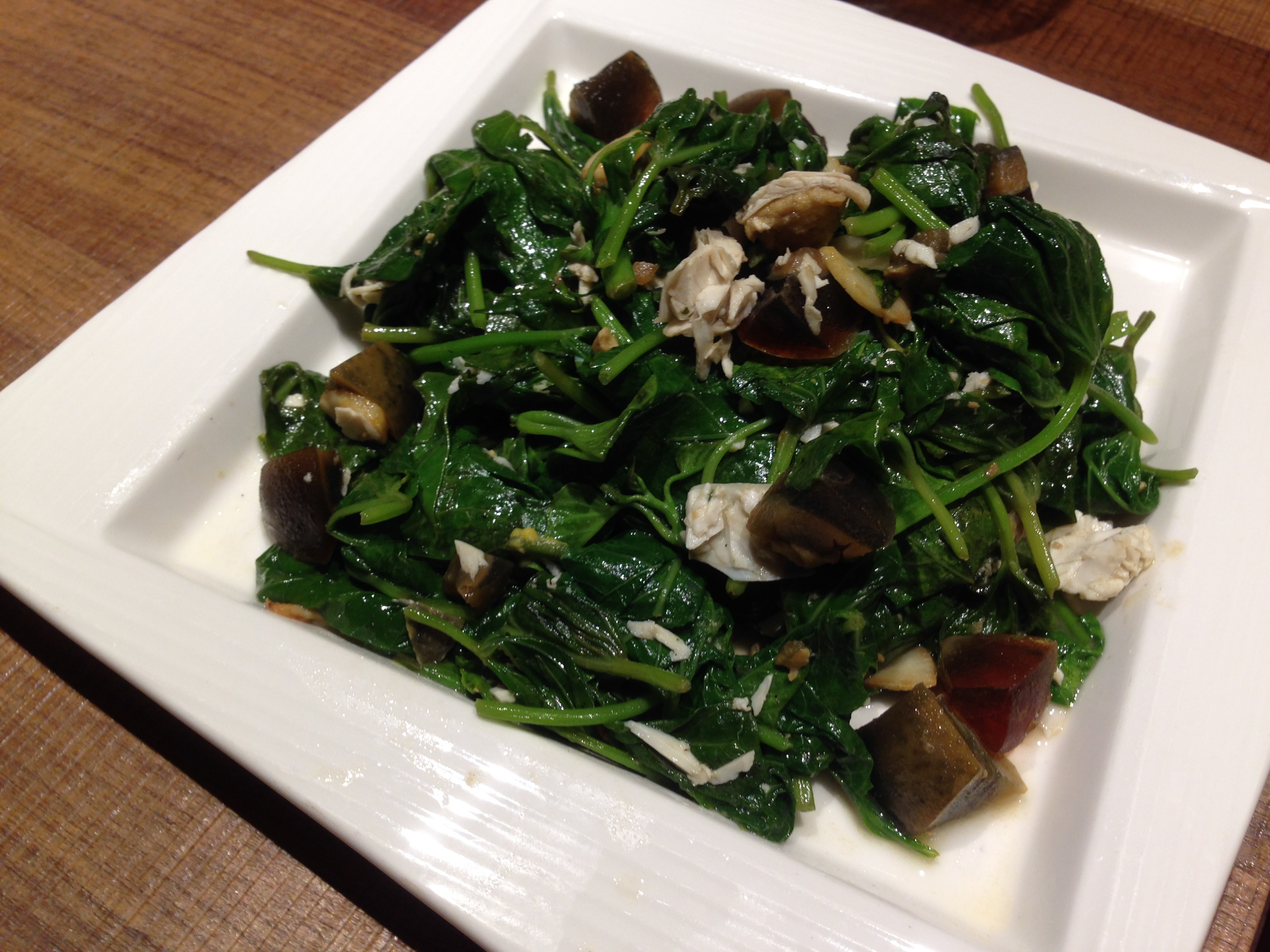 金銀蛋地瓜葉, 叁和院, 參和院, 台灣風格飲食, 台北